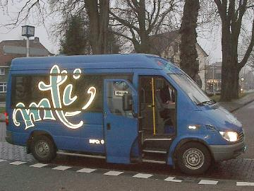 Een MTI-busje voor station Meppel, eigen foto